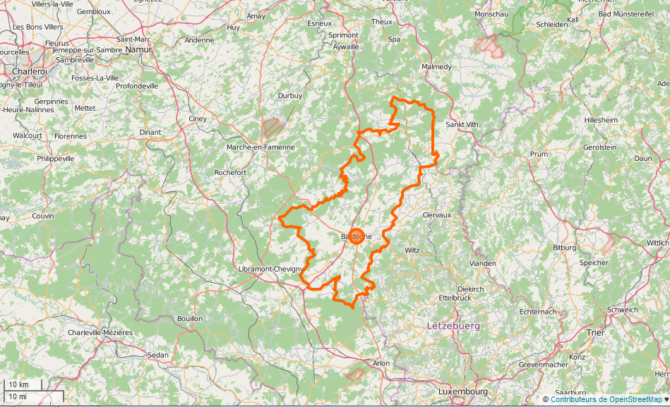 Bastogne Limite administrative de l'arrondissement This map may be incomplete, and may contain errors. Don't rely solely on it for navigation.